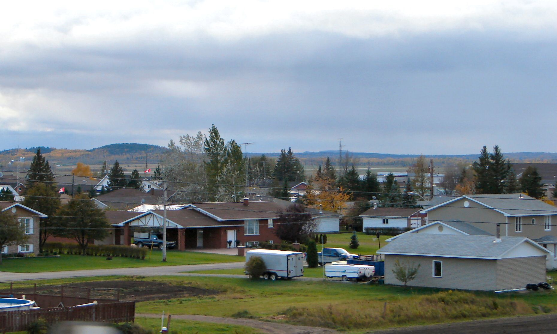 Earlton, Ontario, Canada